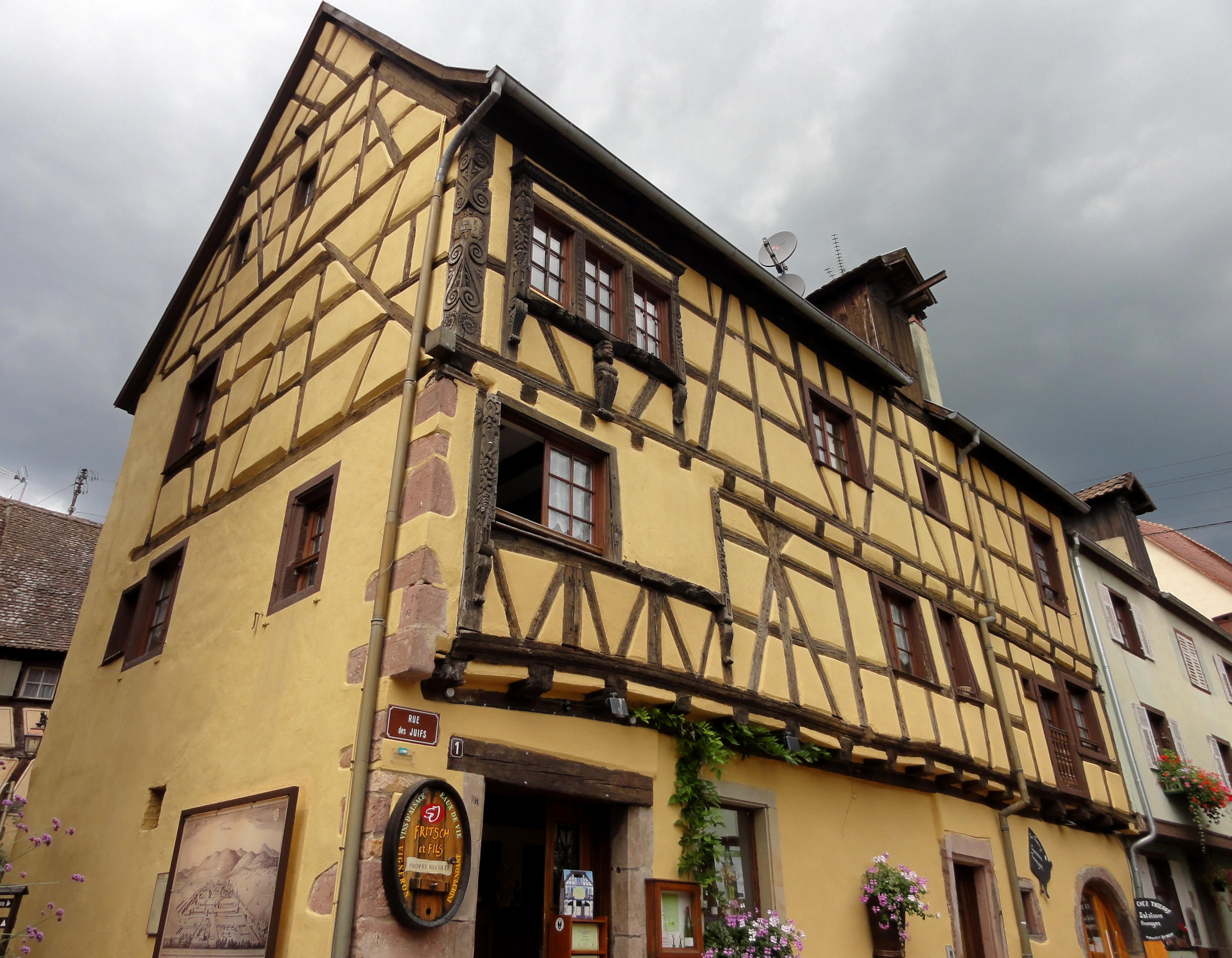 Alsace, Haut-Rhin, Riquewihr, Maison de vigneron (XVIe-XVIIe), 1 rue des Juifs. .